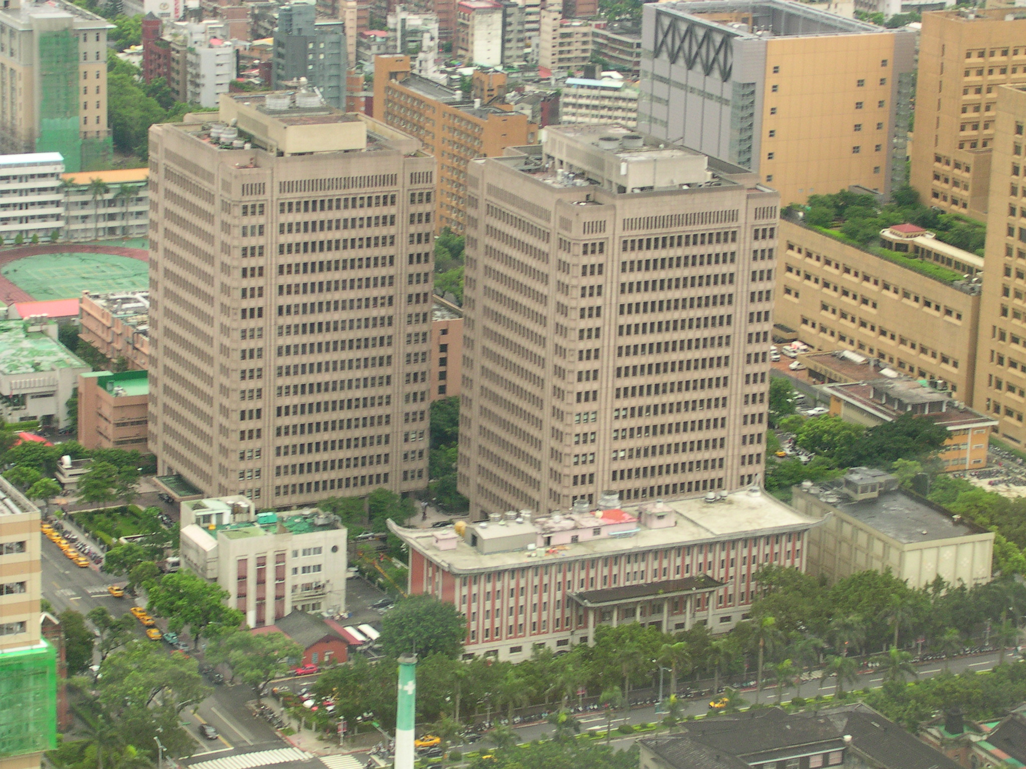 從高處俯瞰中華民國教育部大樓與中央聯合辦公大樓。